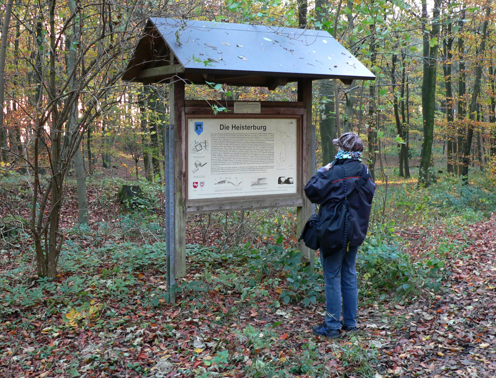 Heisterburg Infotafel von 2005